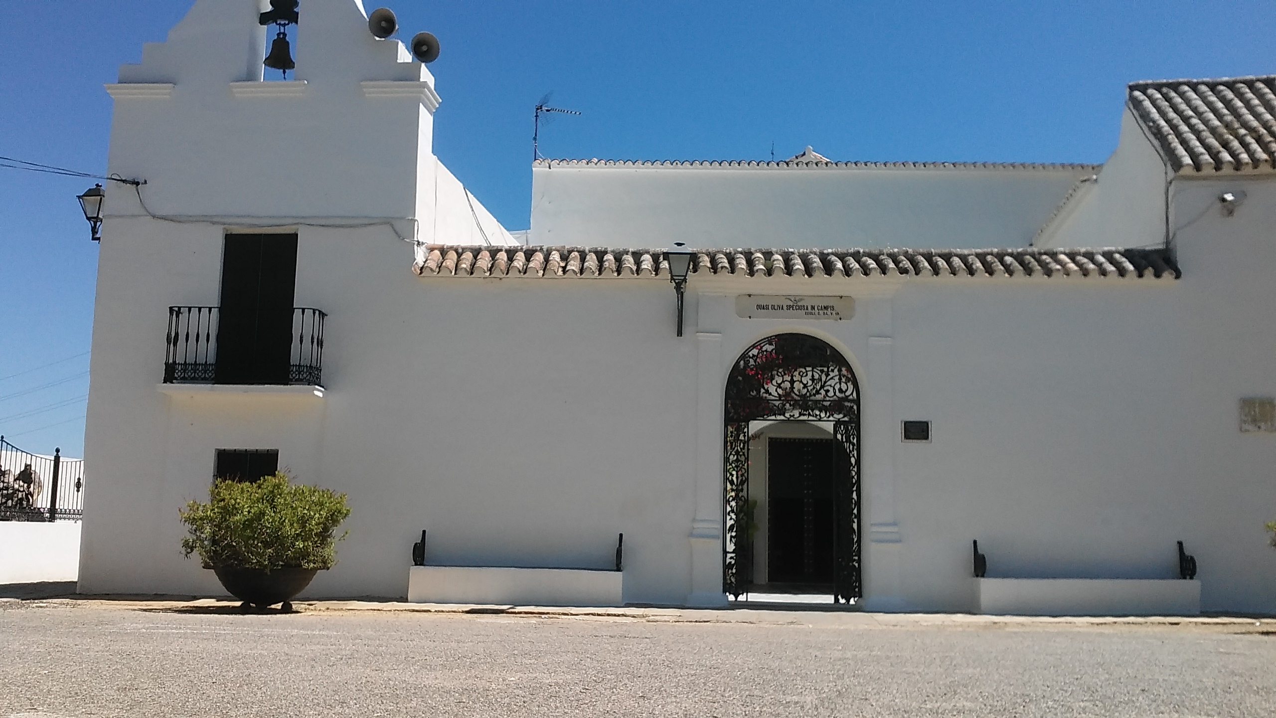 Portada de la Ermita de Nuestra Señora de la Oliva, Vejer de la Frontera (Andalucía, España)